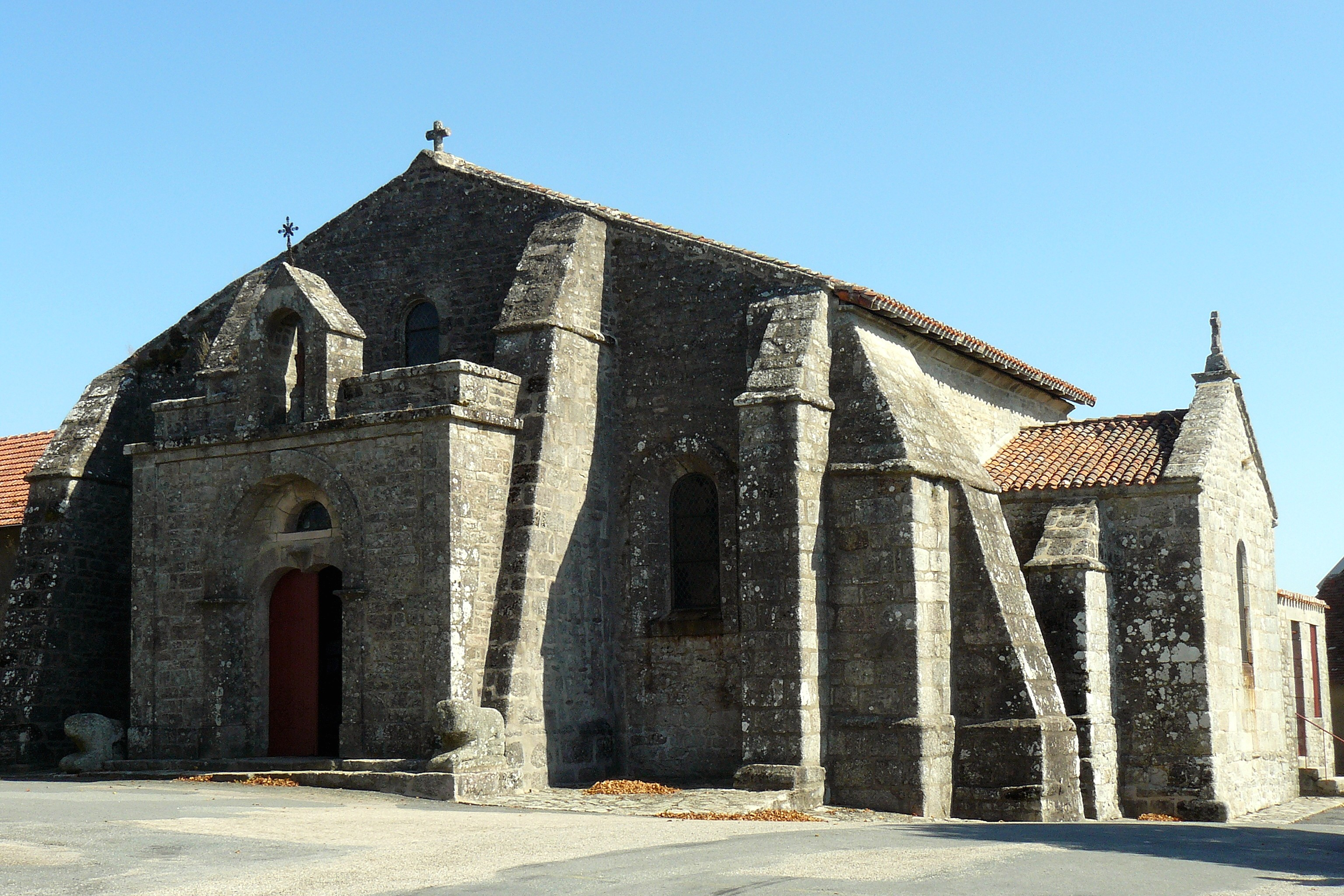 L'église de Toulx-Sainte-Croix (Creuse, France). Le clocher est séparé.